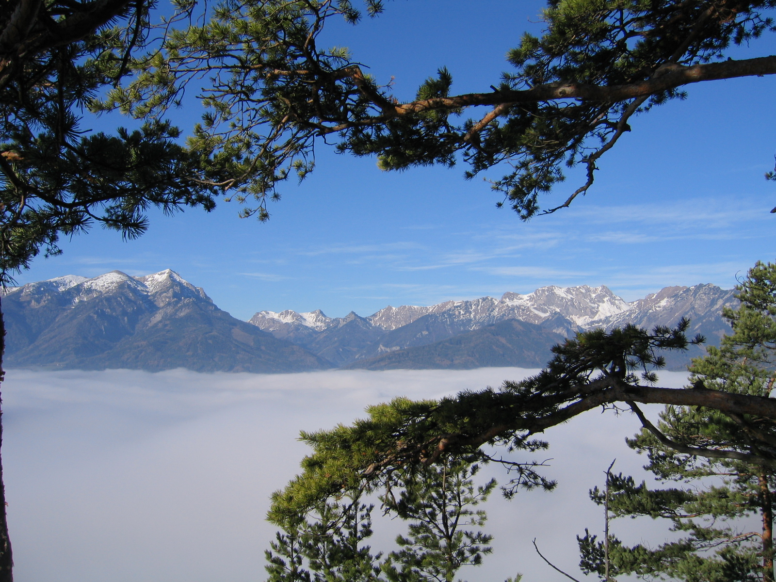 Trofaiach Bergpanorama - Eisenerzer Alpen